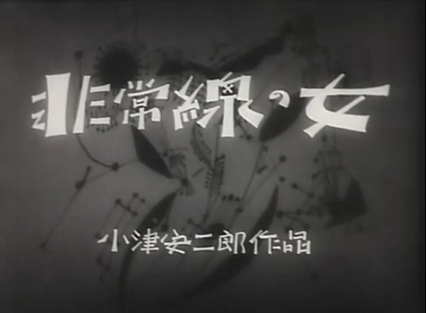 『非常線の女』、カットタイトル、1933年